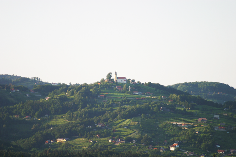 Trška gora